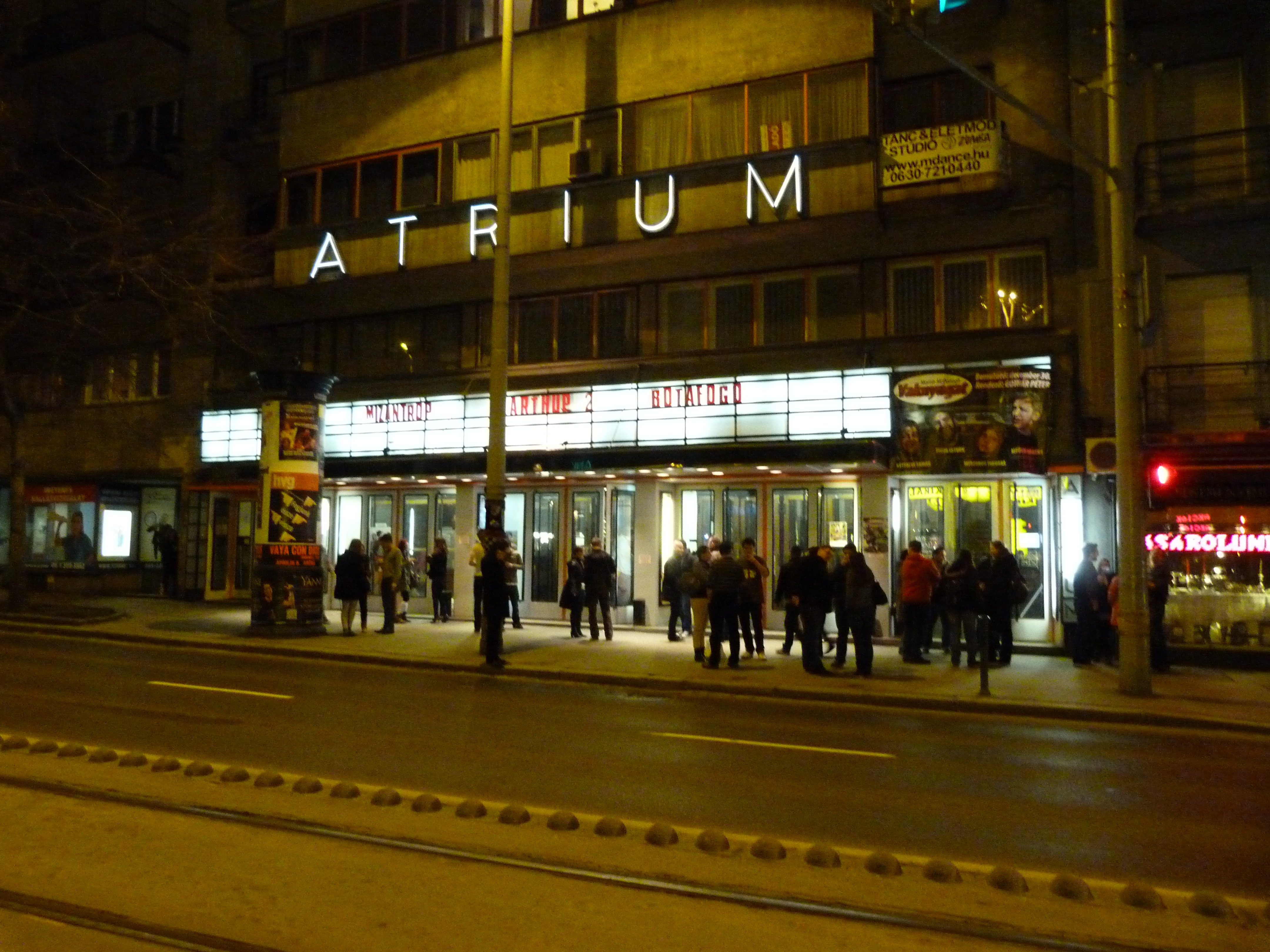 A felvételek 2013. Február 1 –én készültek Budapesten, az Áttrium Filmszínházban (1024 Budapest Margit krt. 55). A Tarantinó Maraton (Átrium Mikrokino VJ Centrum) keretében Quentin Tarantínó Ponyvaregény, Becstelen brigantik és Django című filmjeit vetítette a Filmszínház. A hagyományos 35 mm-es celluloid szalagról vetített filmek gyakran elszakadtak, de ez a fanatikus közönséget nem zavarta. Az éjszakába nyúlt a második film vetítése. Az Utolsó Brigantik vége előtt 10 perccel, jóval éjfél után a közönség nem szavazta meg, hogy folytassuk közvetlenül a Djangoval, hanem ragaszkodott az Utolsó Brigantik befejezéséhez, hogy csak ezt követően folytatódjon a program a Djangóval. Jegyárak a három filmre: egész estés: 1500 Ft, támogatói: 3000 Ft, jelmezes: 1200 Ft. A Kozma Lajos építész által tervezett 7 emeletes art deco házat 1936 –ban adták át. Források: Tarantinó nap az Átriumban Metropol 2013. Január 31, Szabó Zoltán: Feltámadt az Átrium mozi